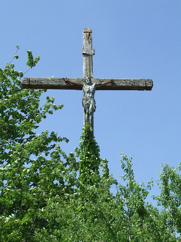 Calvaire de mission en bois à Étais-la-Sauvin (sortie village direction Entrains-sur-Nohain)